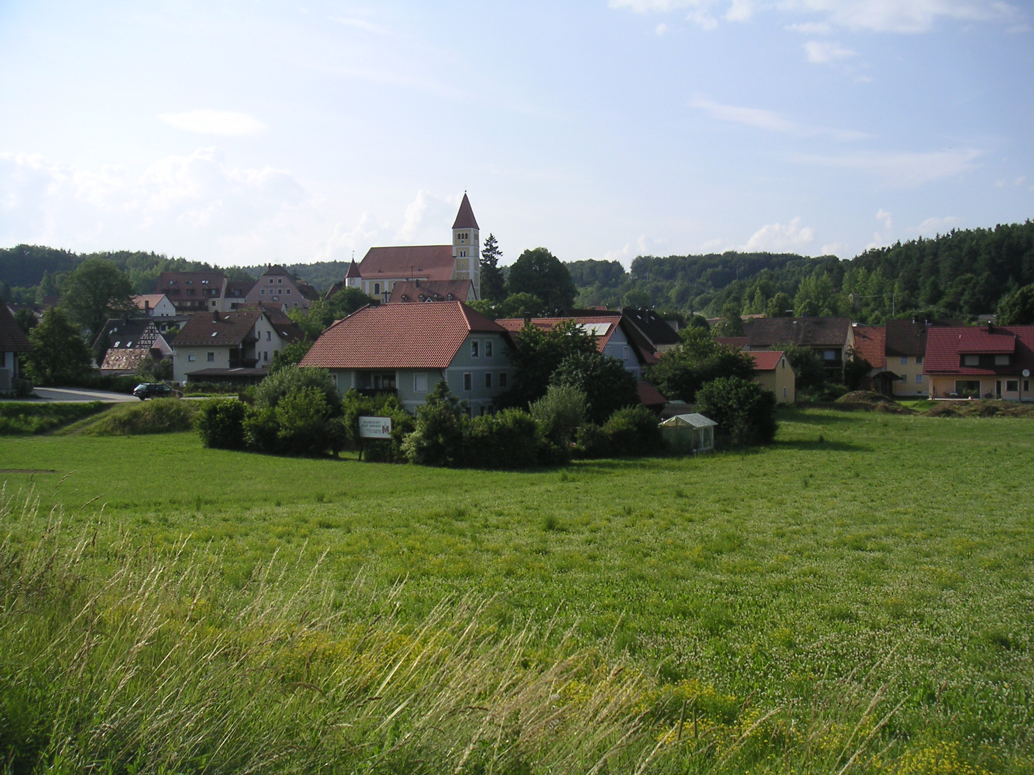 Blick auf den Ortskern und Kirche von Illschwang. Standort ist die Straße nach Pürschläg, etwas außerhalb von Illschwang